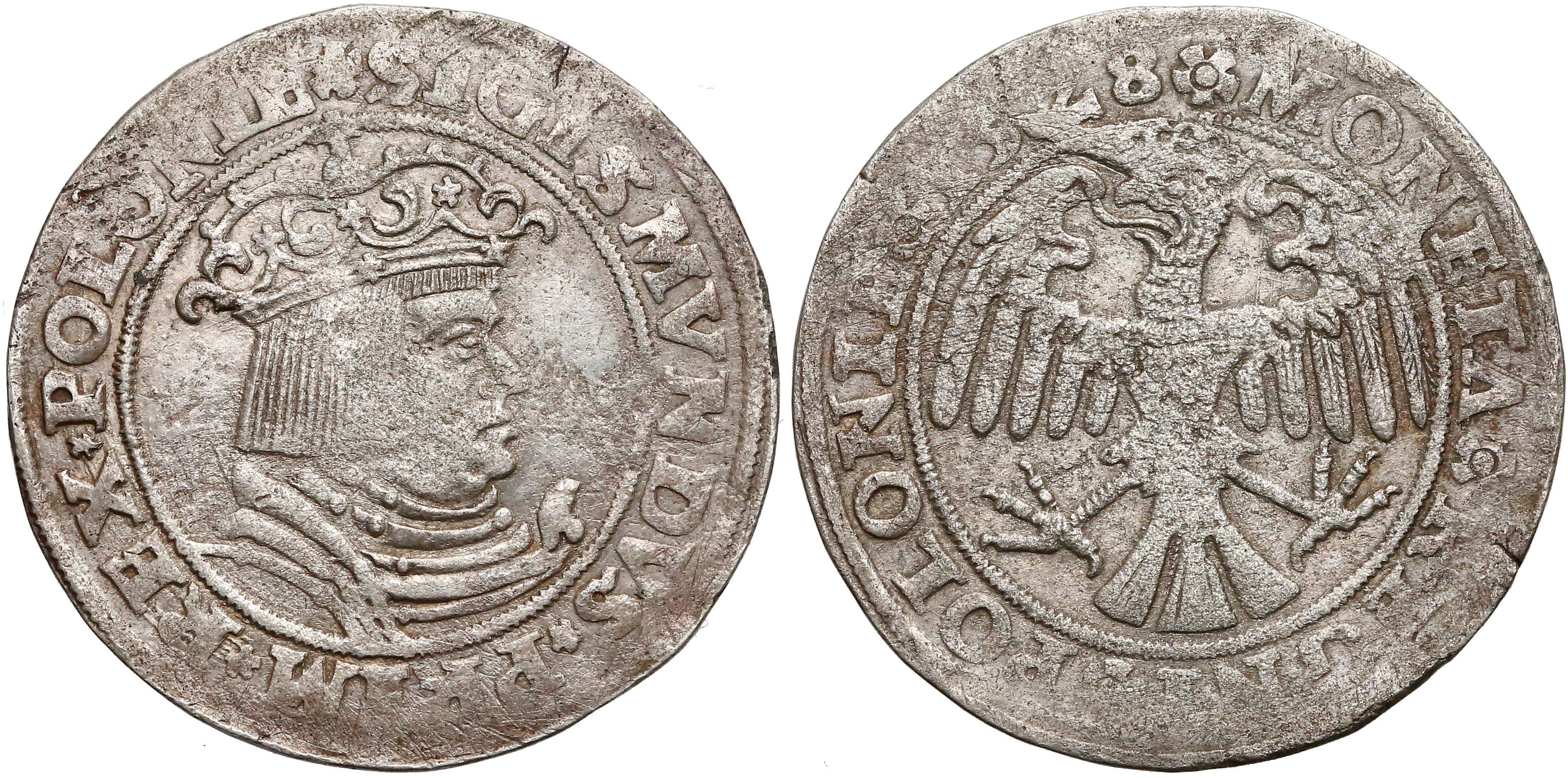 Trojak koronny 1528 Kraków